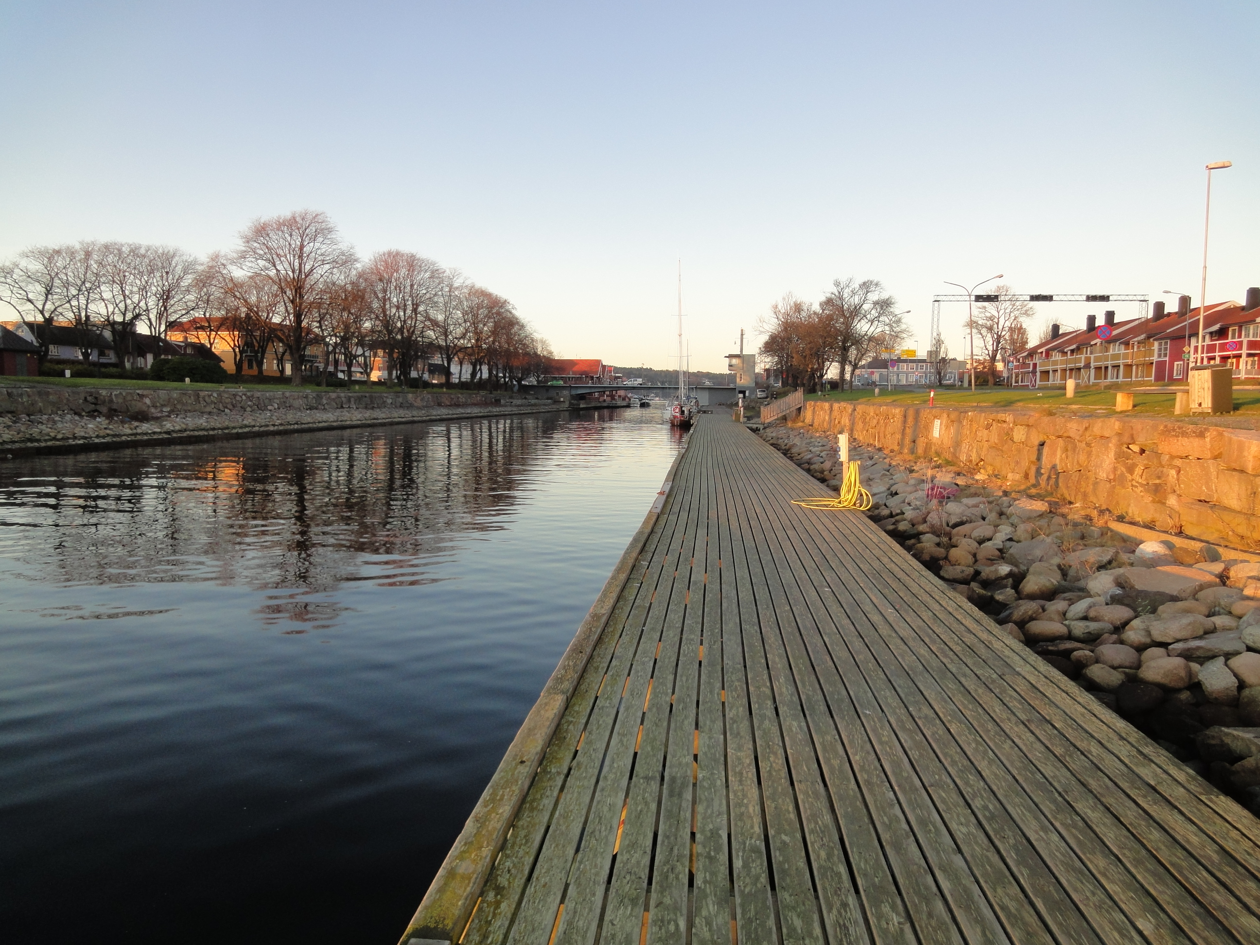 Kanał w Moss, Norwegia. ostatnie dzieło A. Waligórskiego w Norwegii